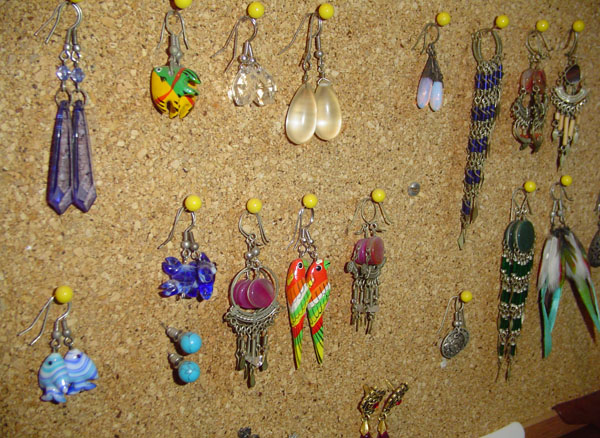 Penduricalhos